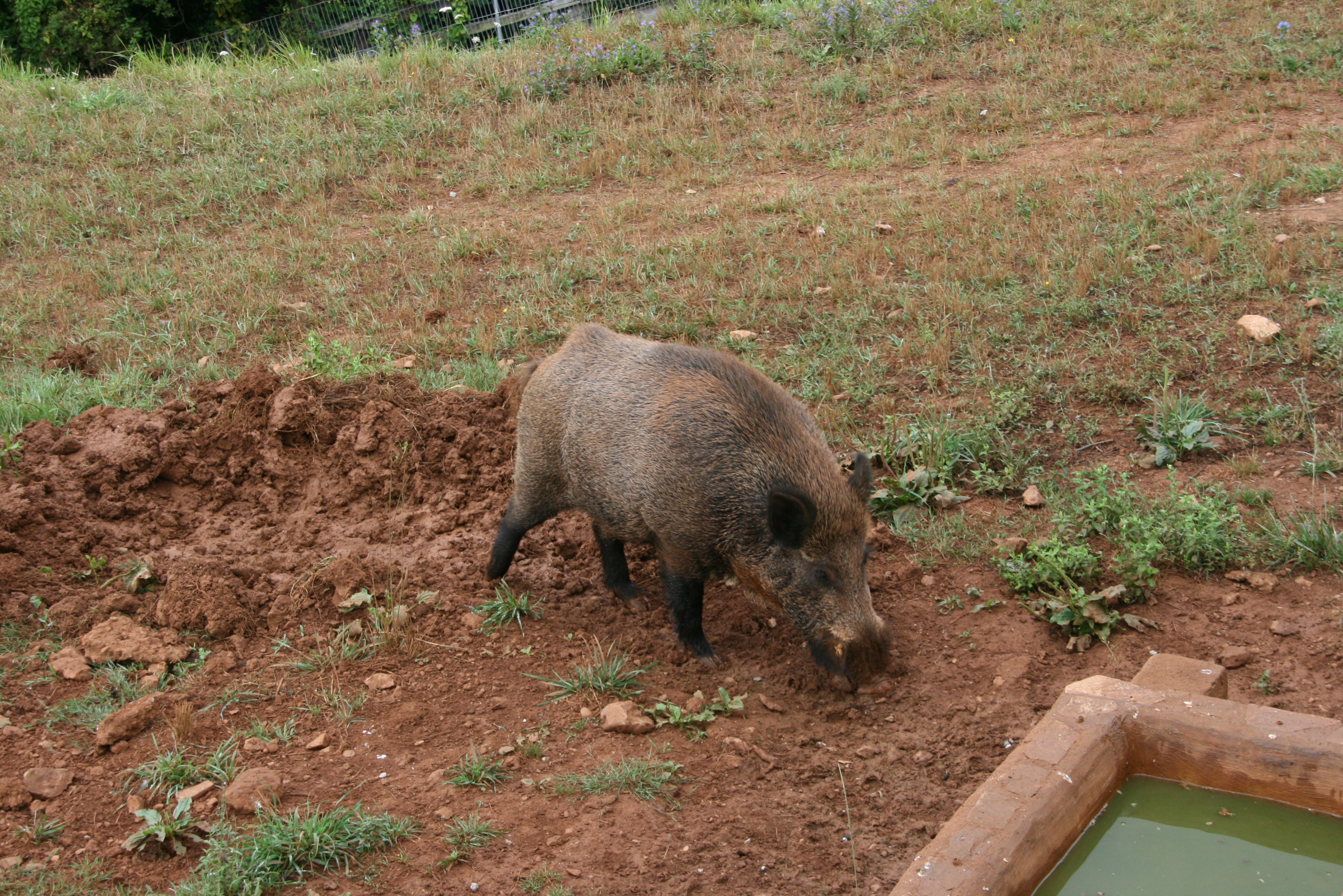 Jabalí en el Parque de la naturaleza de Cabárceno